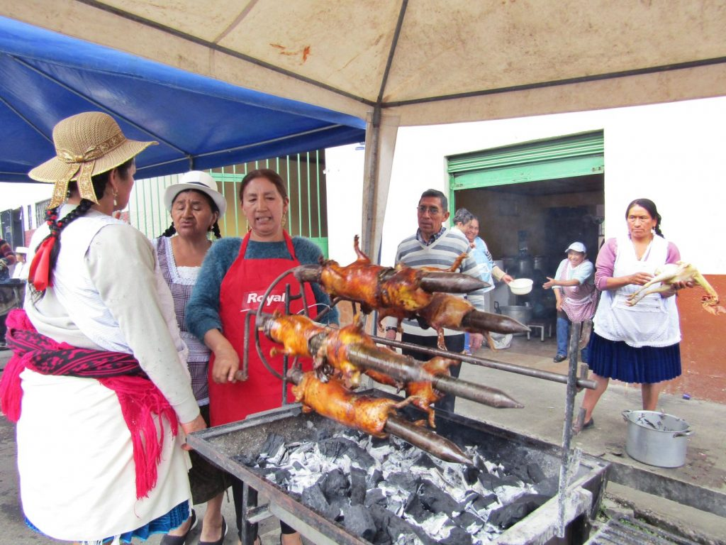 Comida Tipica Sayausí